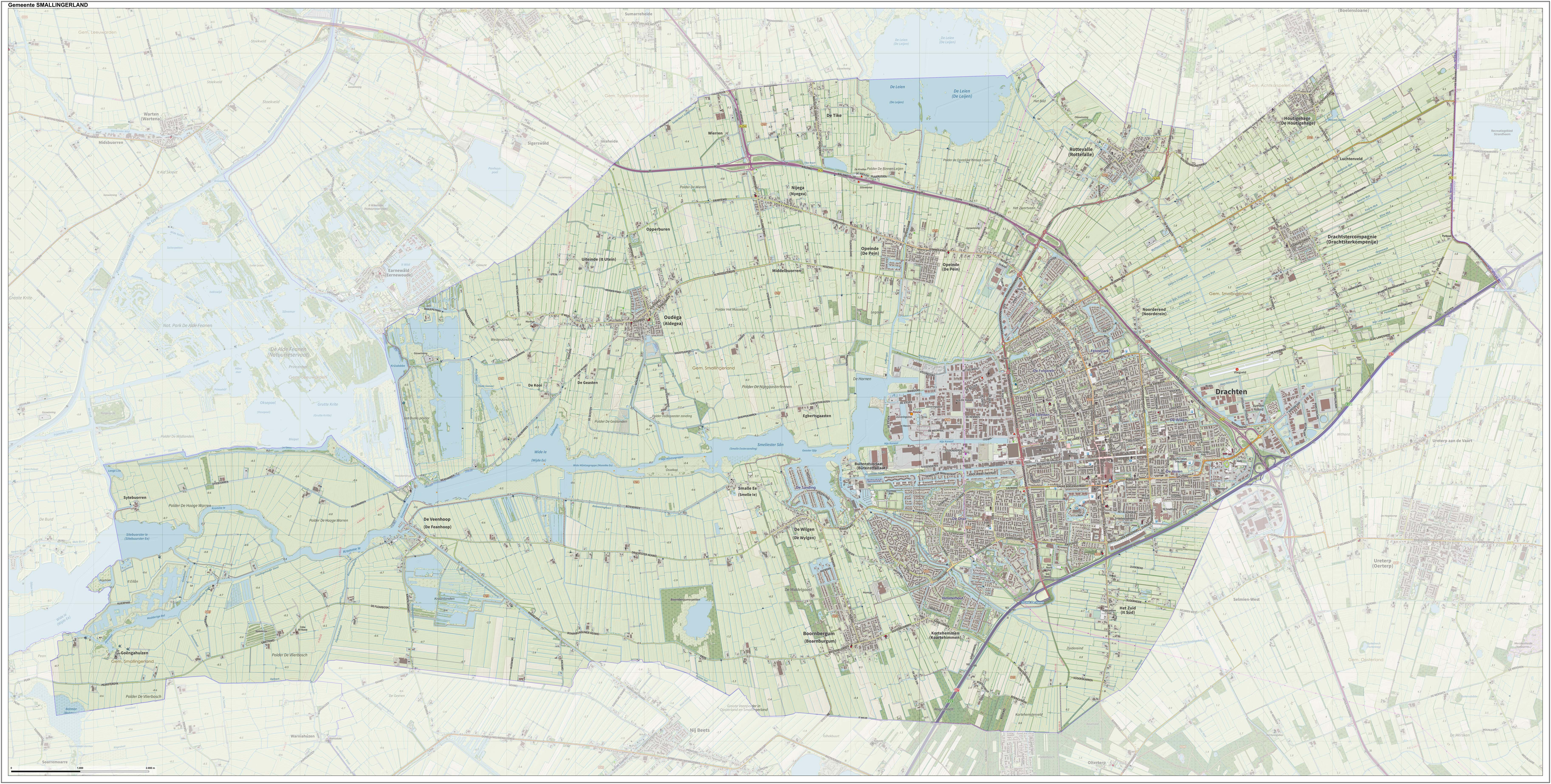 Topografische gemeentekaart. Resolutie: 400 pixels/km. Kaartbeeld samengesteld uit de open geodata van de Top10NL en Top25namen (Kadaster), Creative Commons-BY licentie. Gebouwvlakken uit open geodata BAG extract. Wegen uit de OpenStreetMap, OpenStreetMap community. Reliëfschaduw uit de Actuele Hoogtekaart AHN2. Samenstelling en kleurenschema: Jan-Willem van Aalst, met QGIS. Zie ook de Legenda.